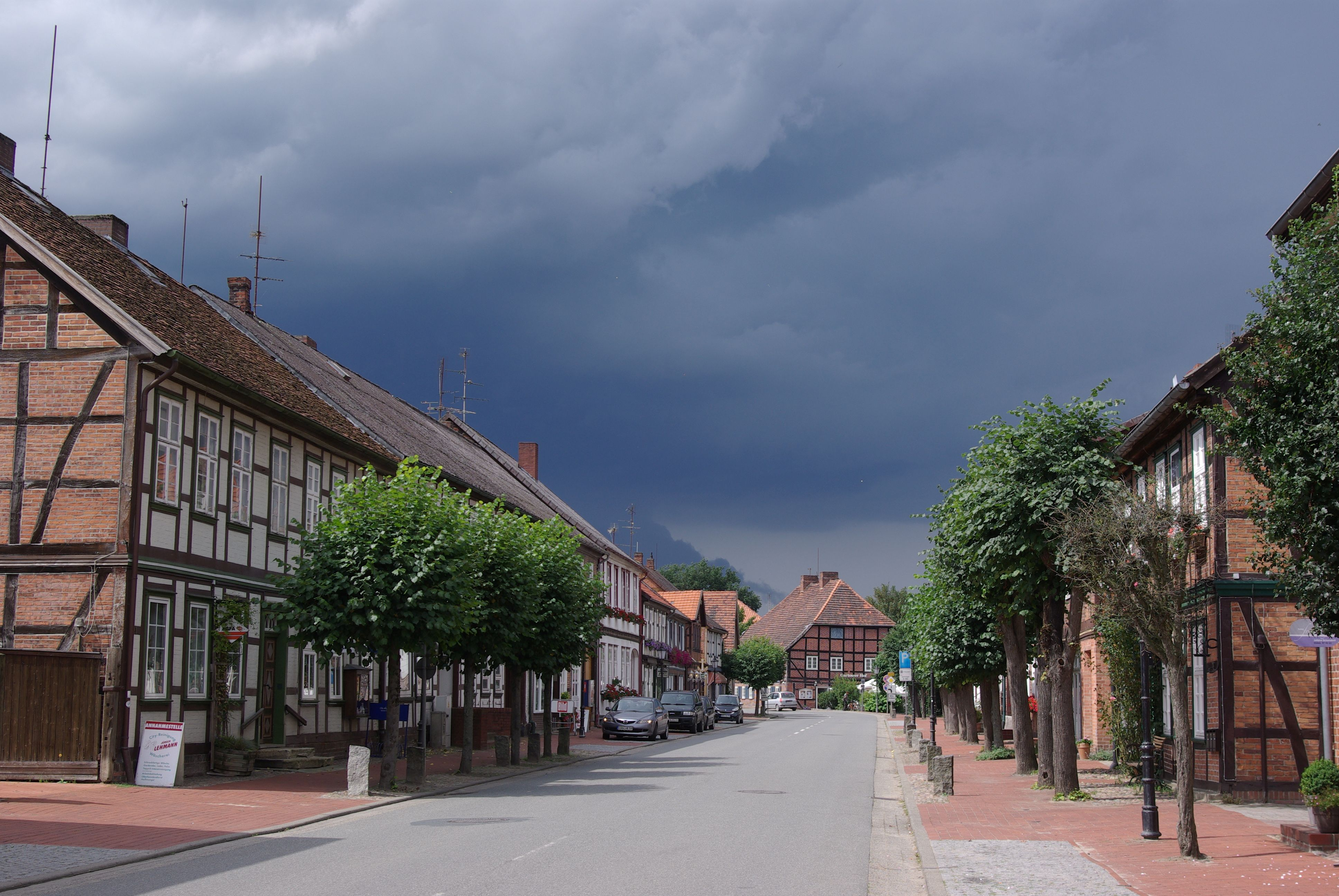 Gartow im Landkreis Lüchow-Dannenberg in Niedersachsen. Die gesamte Straße steht als Ensemble unter Denkmalschutz. Die Straße mit ihren Häusern wurde nach einem Brand im Jahre 1721 angelegt. Die Hauptstraße ist Teil der Bundesstraße 493.